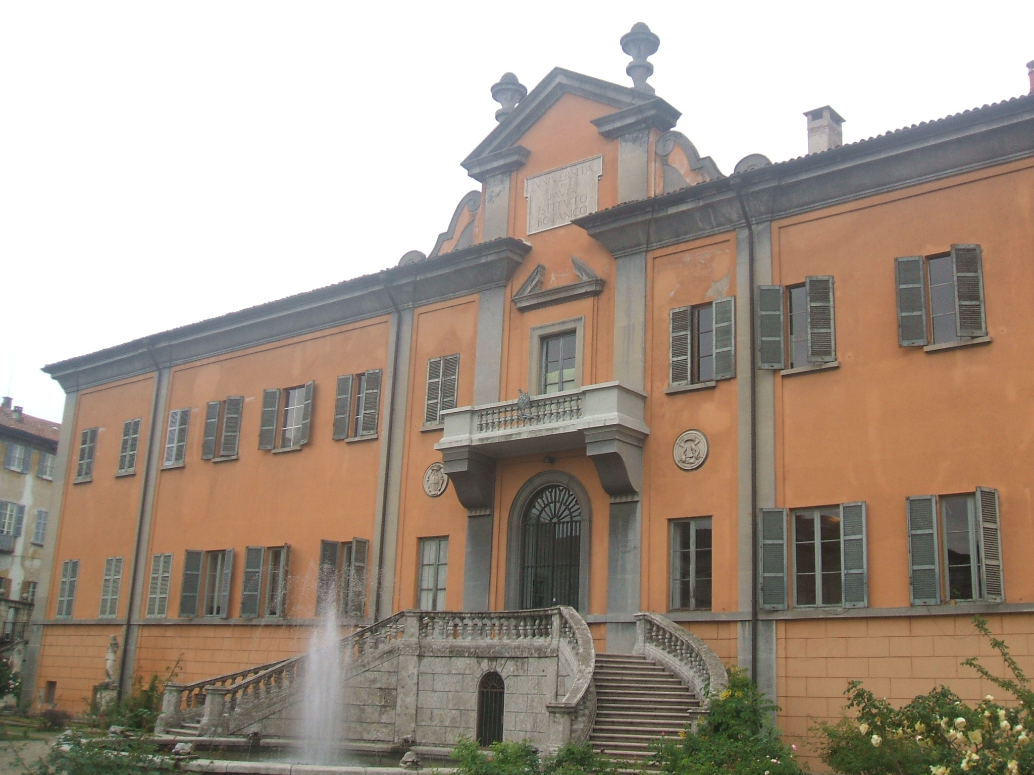 Facciata Orto botanico di Pavia